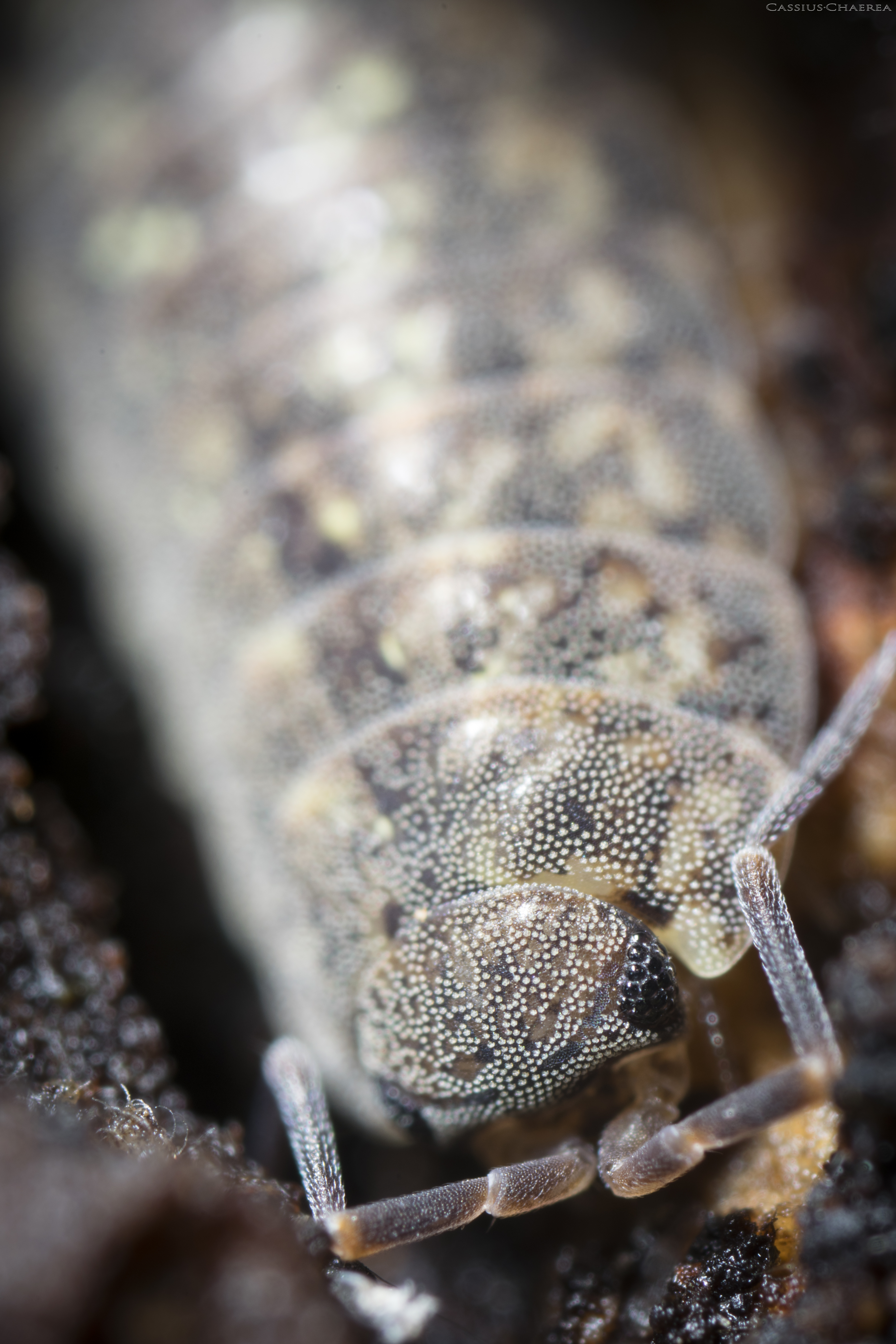 korýšovitý suchozemský druh